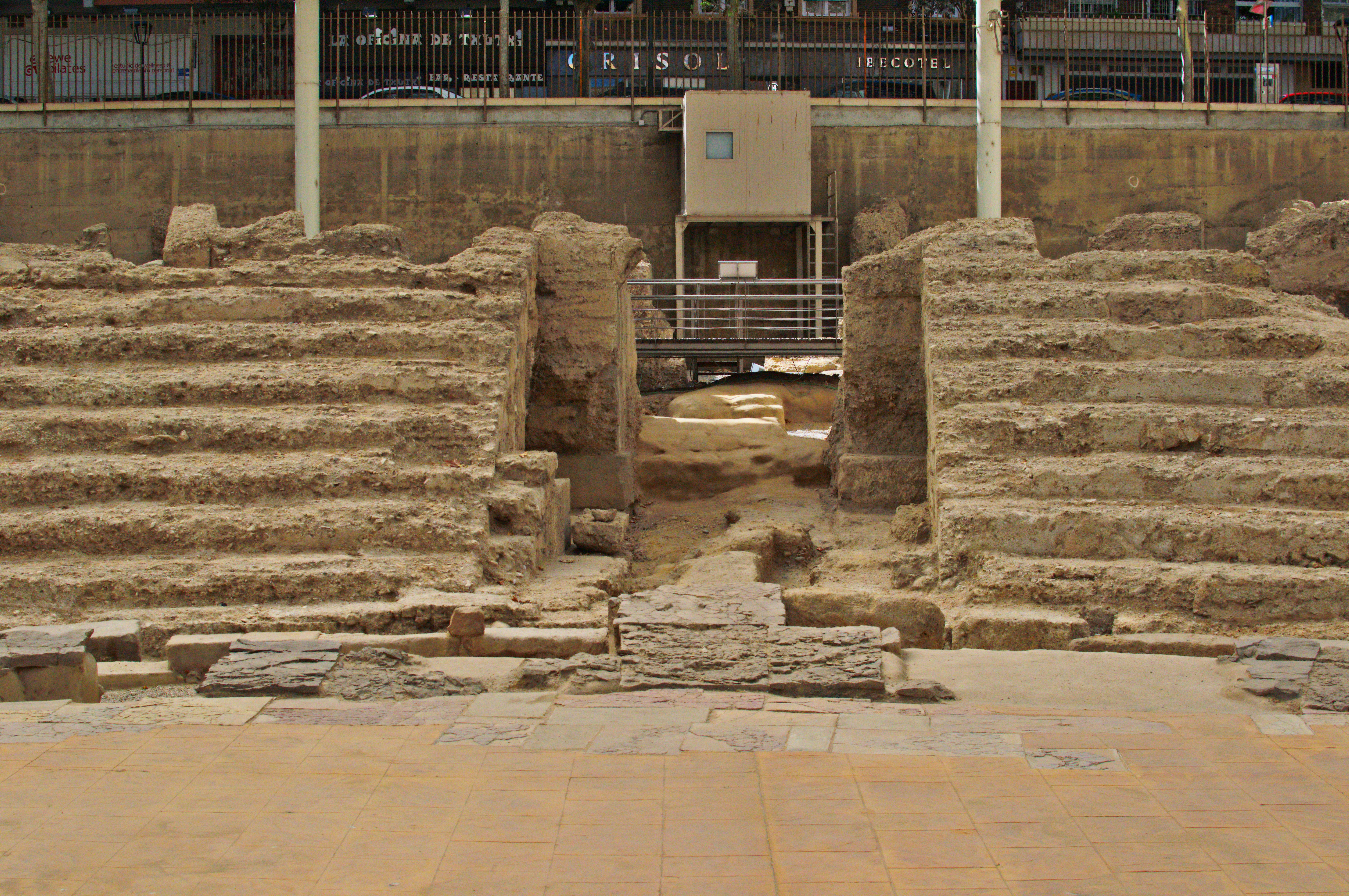 Teatro romano de Caesaraugusta (Zaragoza).